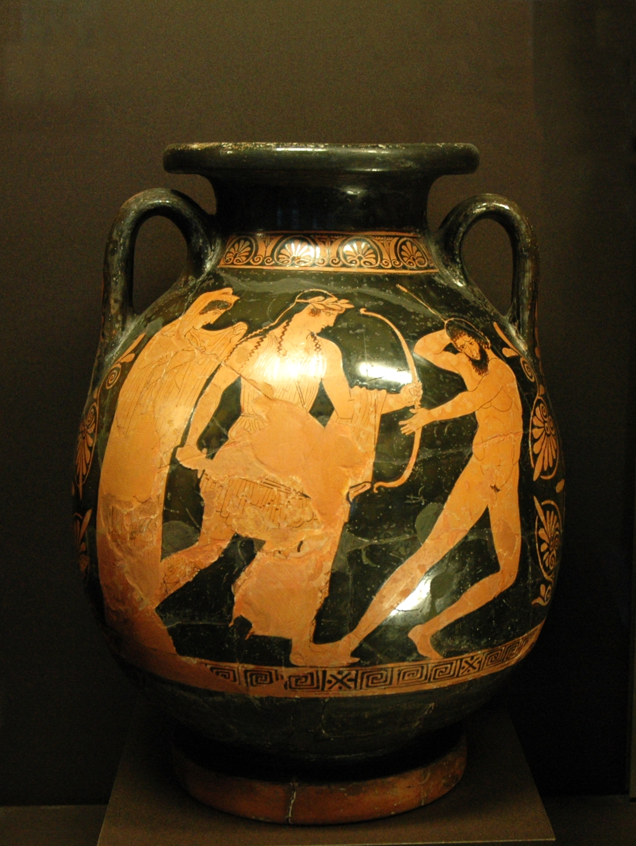 Apollo piercing with his arrows Tityos, who has tried to rape his mother Leto. Side A from an Attic red-figure pelike, ca. 450–440 BC.